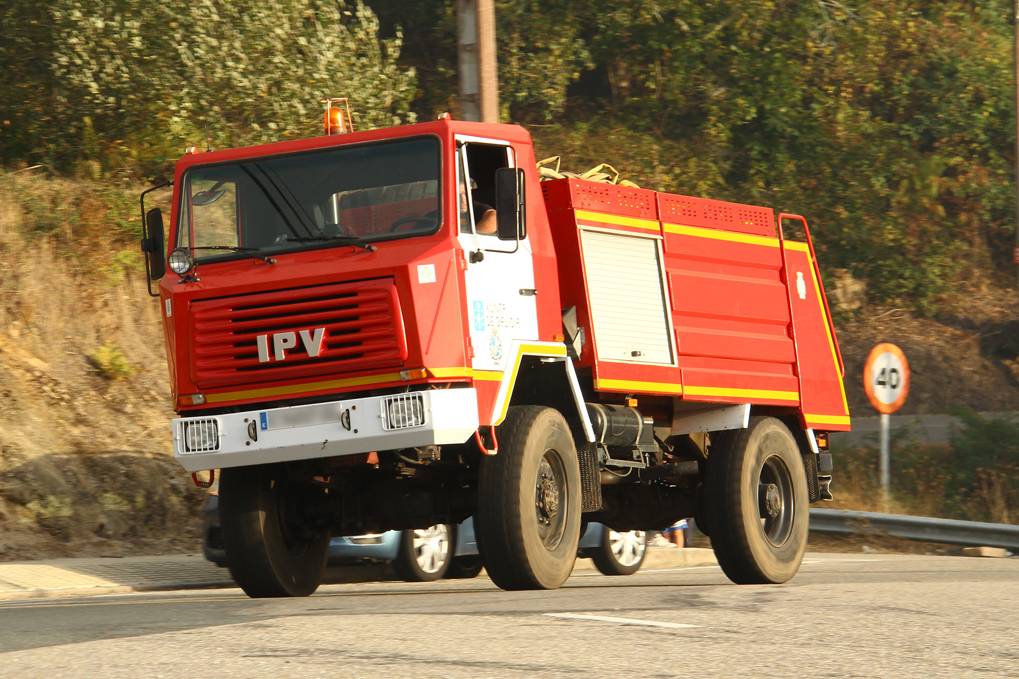 Ola de terrorismo incendiario en Galicia Wave of incendiary terrorism in Galicia